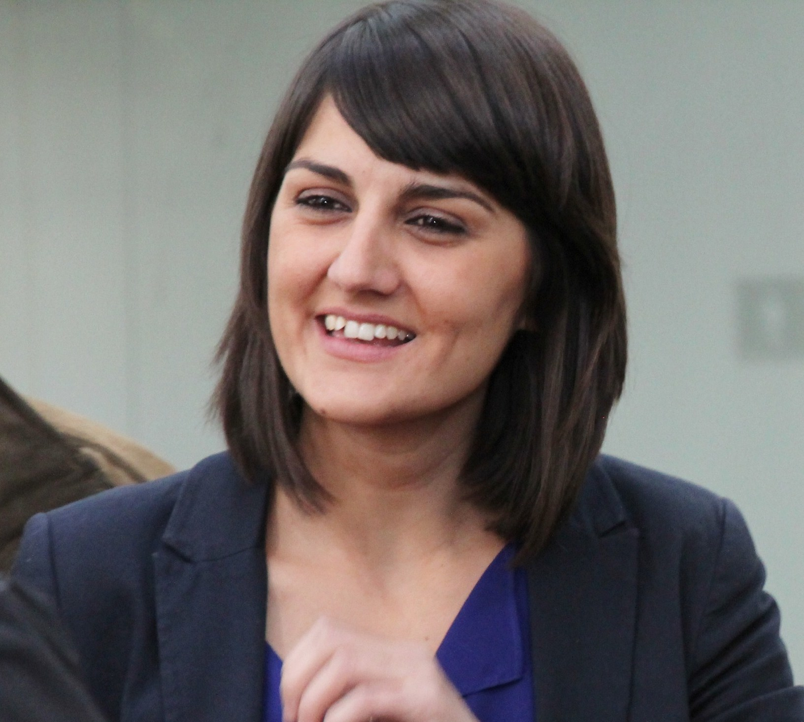 María González Veracruz en janvier 2012 durant la campagne de Rubalcaba au secrétariat général du PSOE.